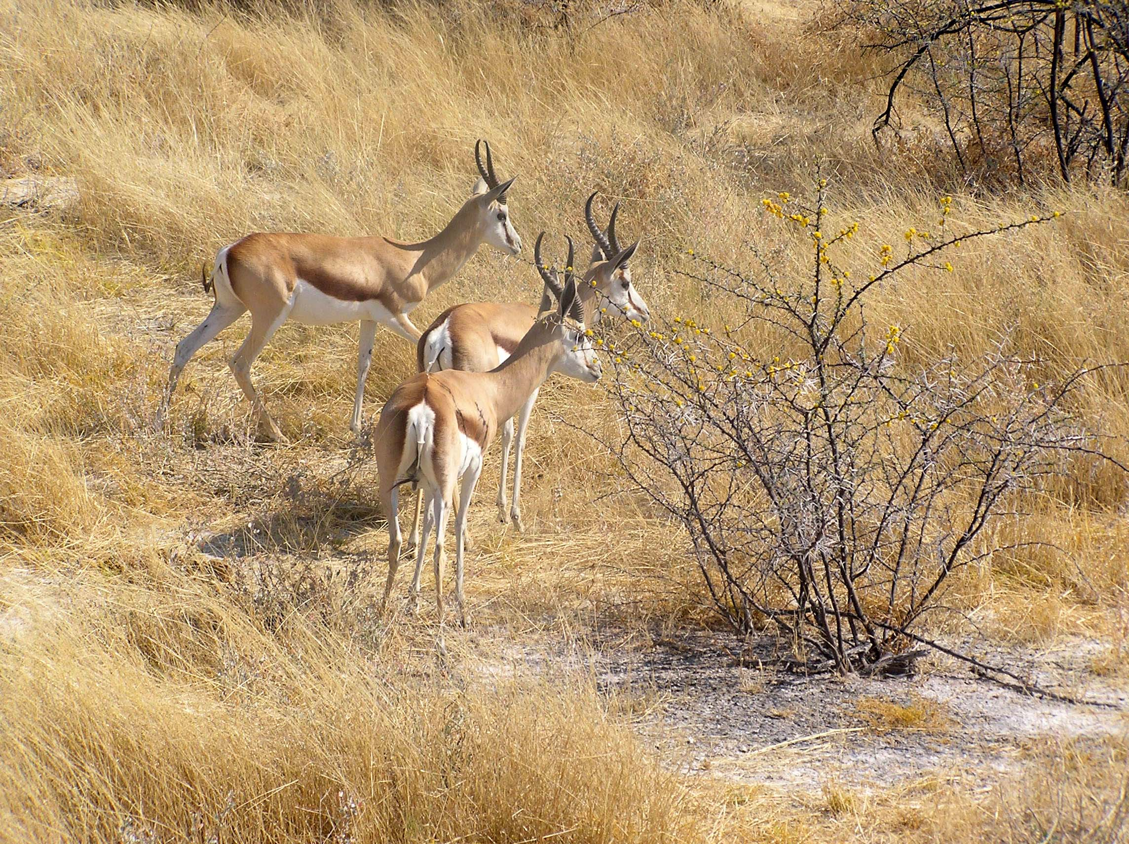 Gacelas saltarinas (springboks) en Etosha